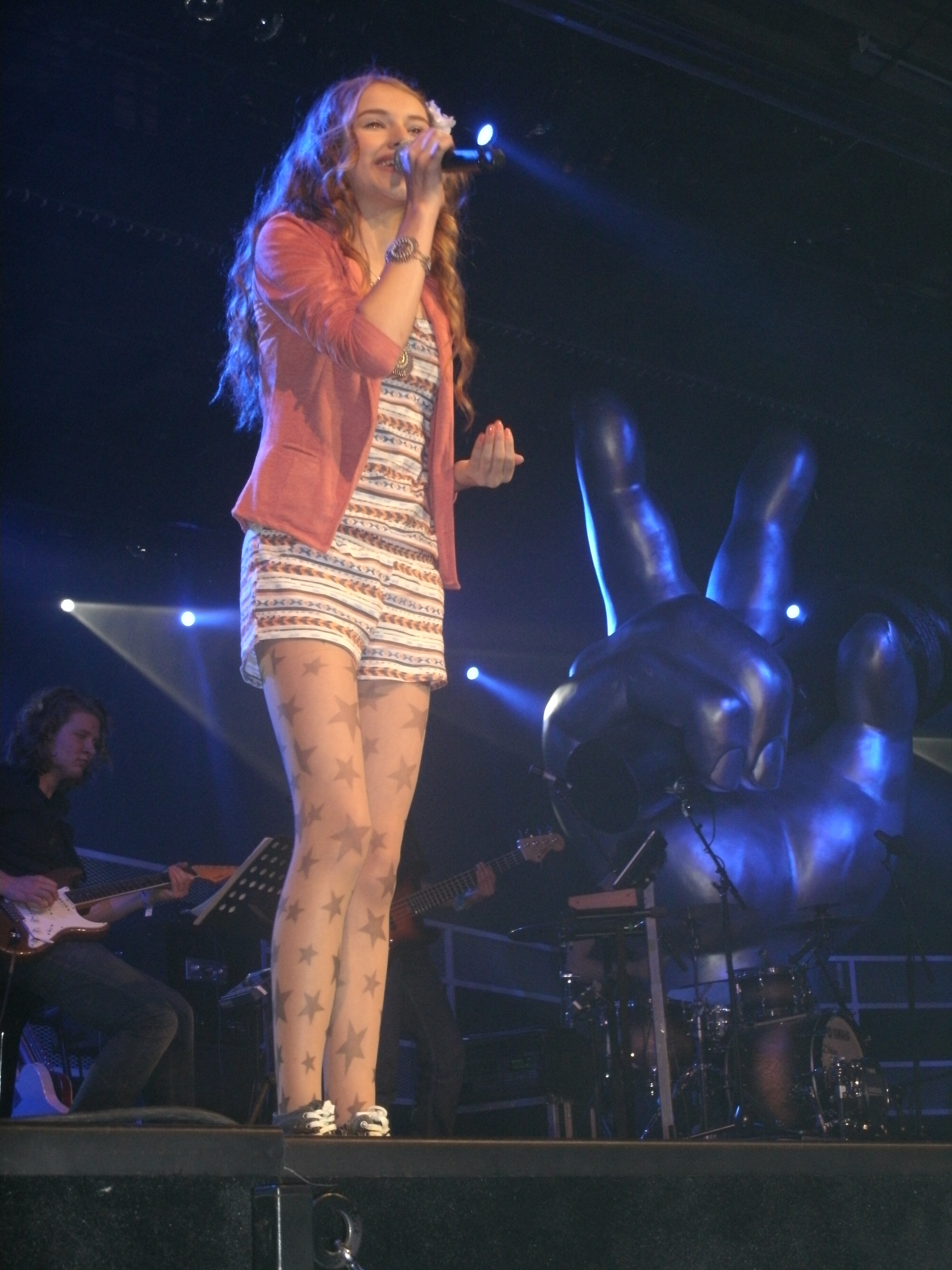 Nederlands zangeres Vajèn van den Bosch, tijdens het concert van the Voice Kids